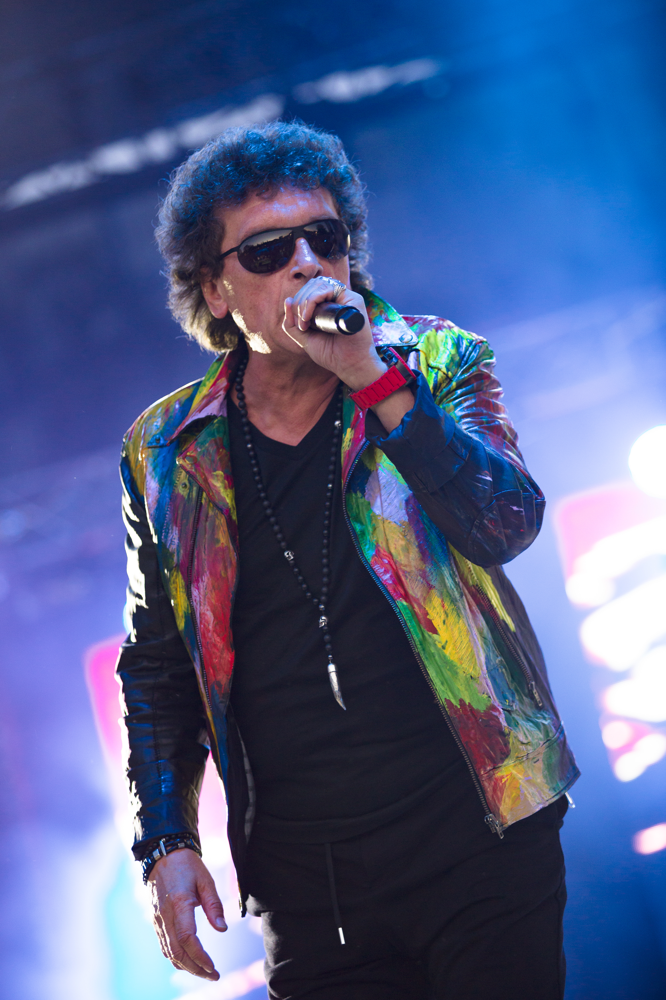 Janusz Panasewicz, koncert Lady Pank podczas Juwenaliów Politechniki Warszawskiej w 2017.